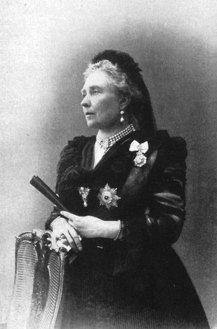 Vitória do Reino Unido, Imperatriz-viúva da Alemanha.